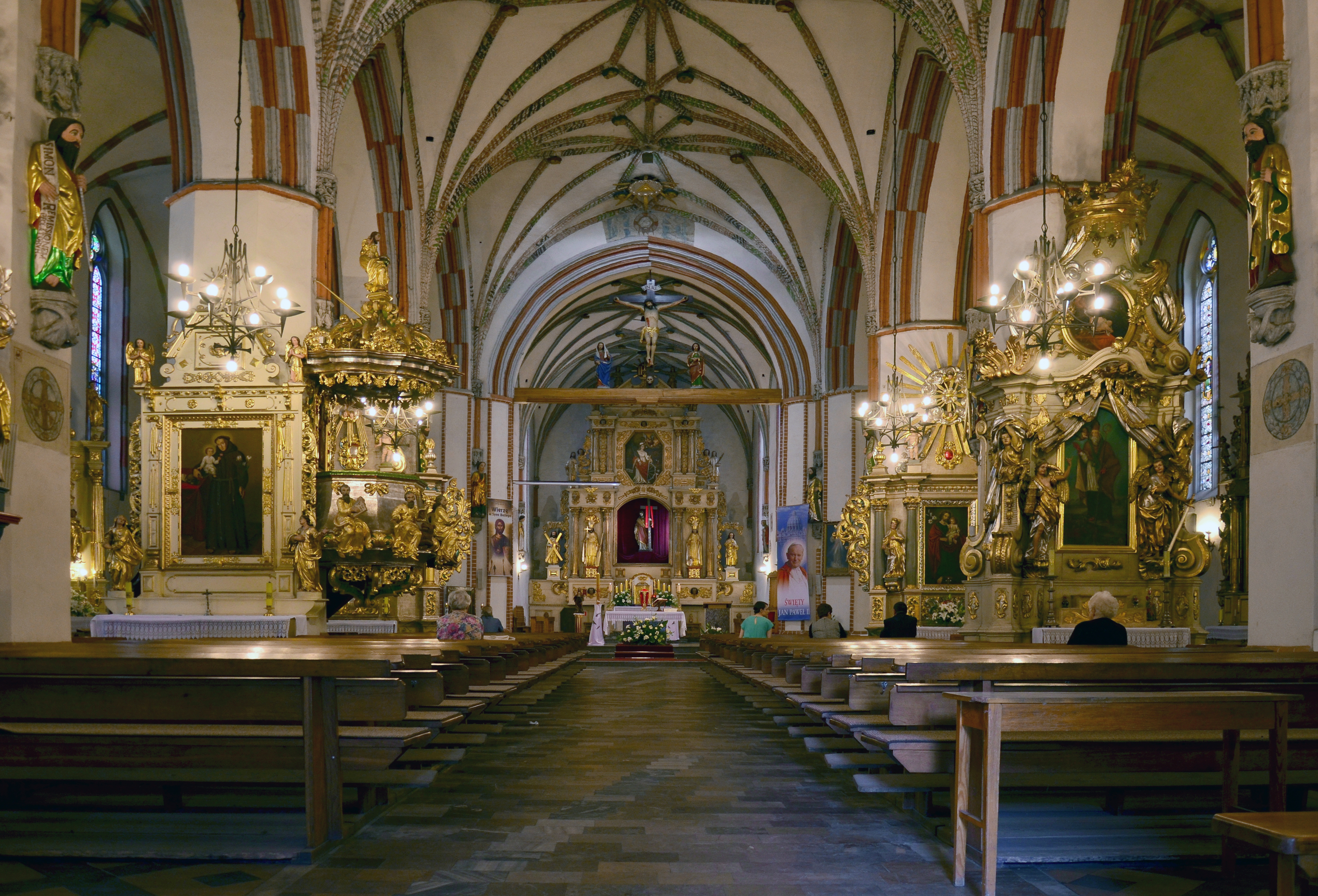 Brodnica, ul. Farna - rzymskokatolicki kościół parafialny pw. św. Katarzyny, 1285-XIV (nawa główna)